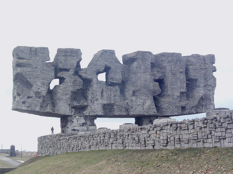 אנדרטה במיידנק. צילום ייחודי שכן הוא מדגים עד כמה האנדרטה גדולה בשל האדם שעומד לבדו לצידה. 2009.